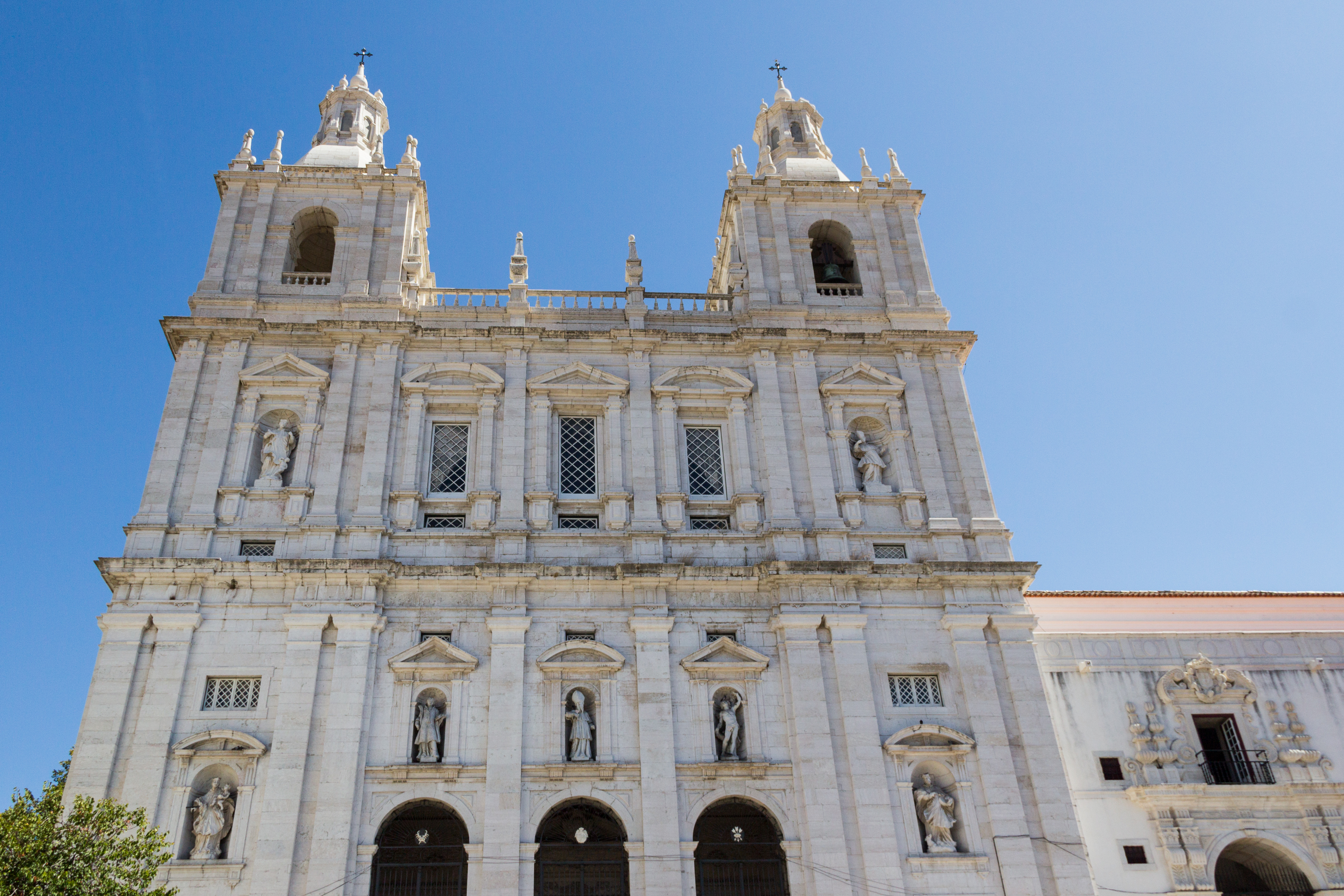 Igreja de São Vincente